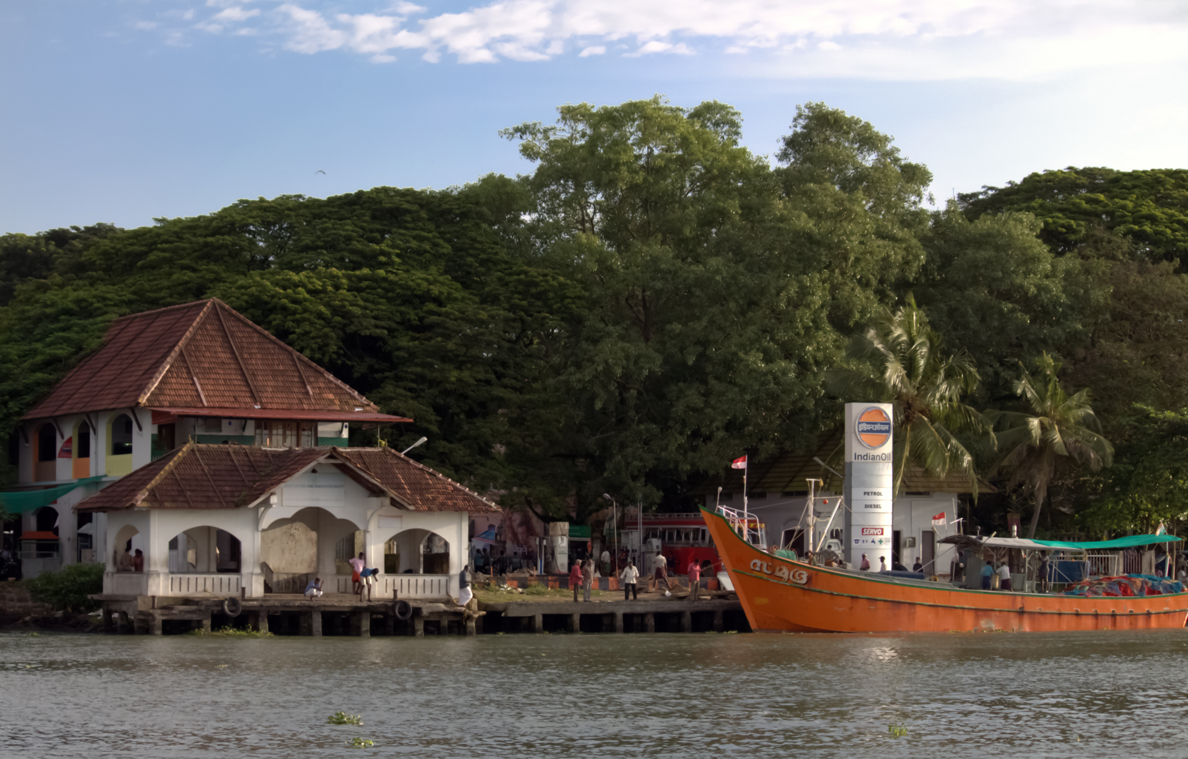 ഫോർട്ട് കൊച്ചിയിൽ ബോട്ടുകൾക്കായുള്ള ഇന്ധന വിൽപ്പനകേന്ദ്രം.